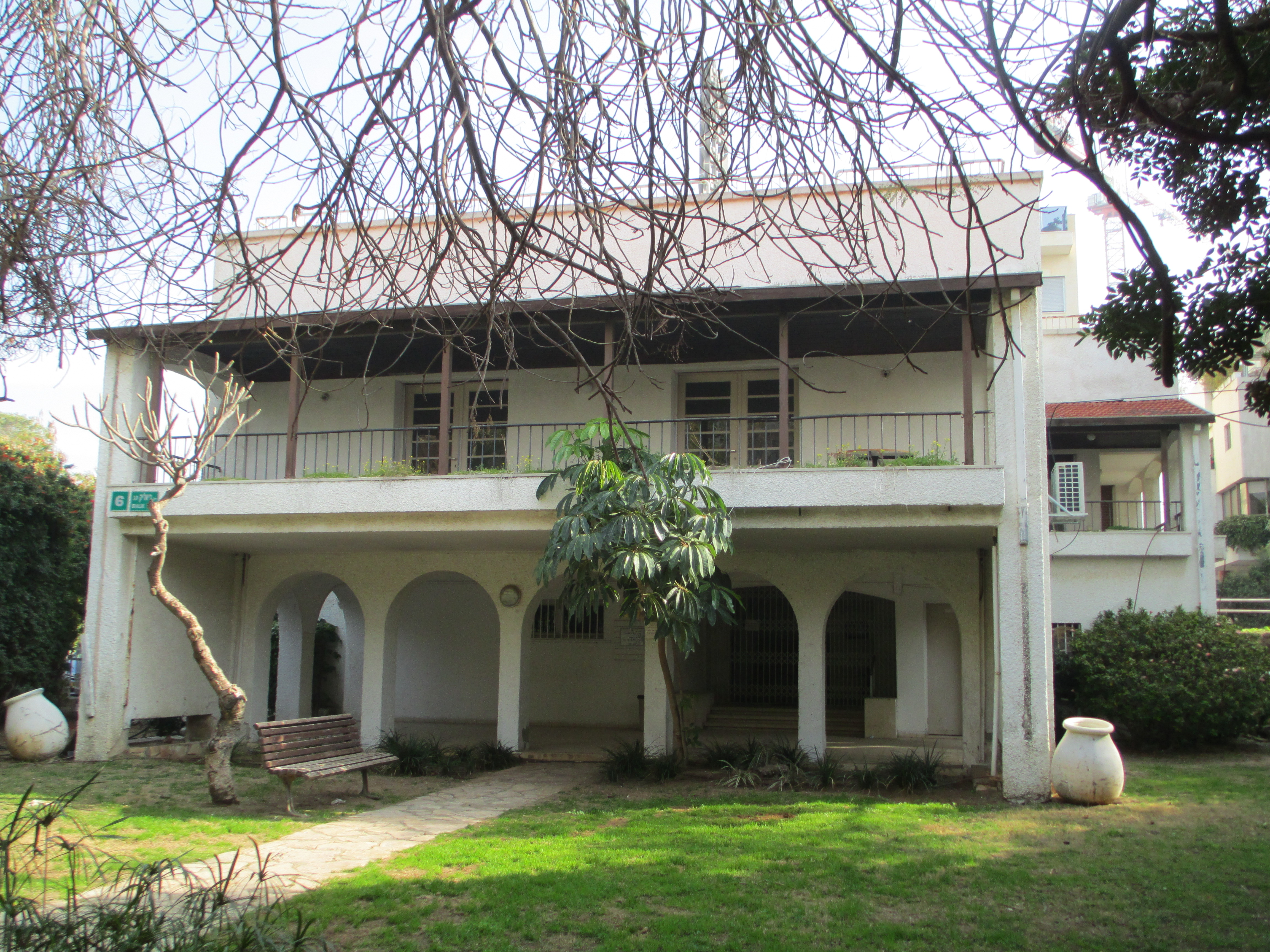 בית טייבר בגבעת רמב"ם